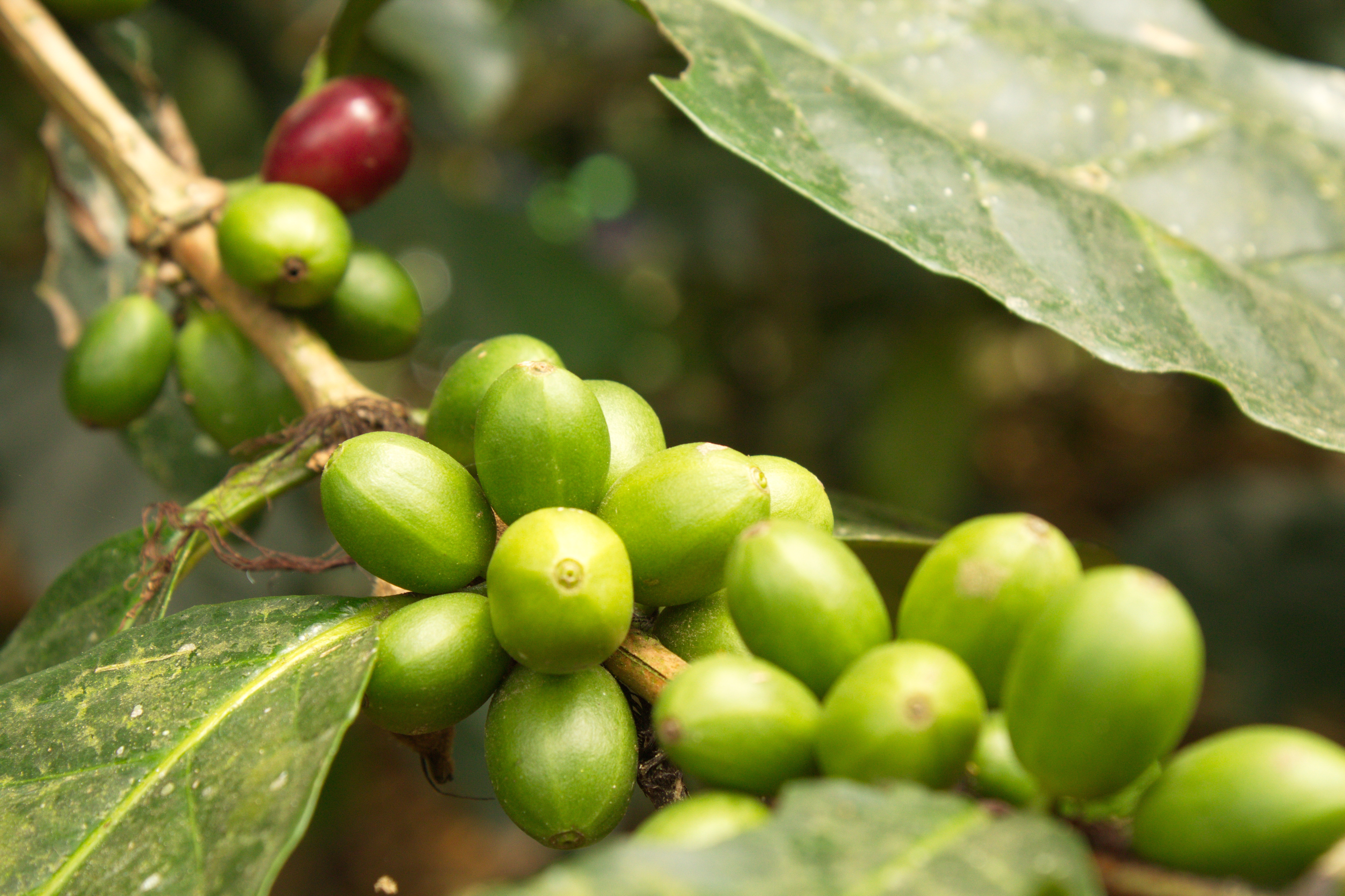 Granos de cafe en planta. Sin madurar. Esta fotografía fue tomada en el municipio colombiano con código Quimbaya, Quindio, Colombia.